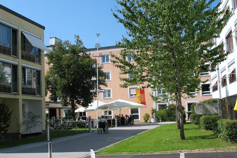 Alten- und Pflegeheim der Hospitalstiftung Kaufbeuren